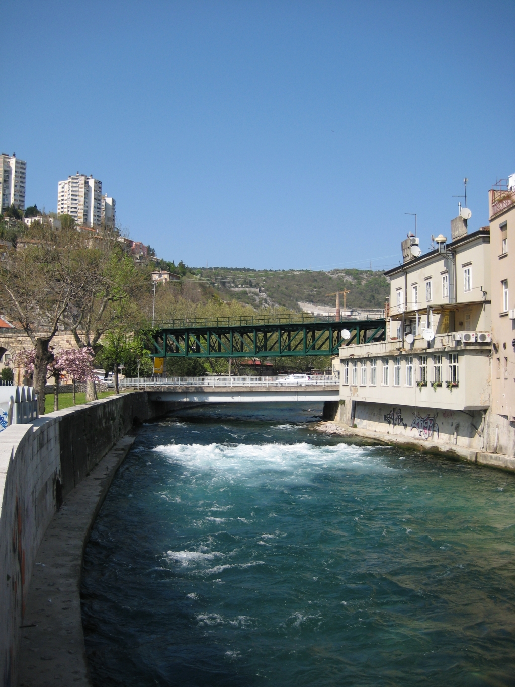 Rječina u Rijeci.